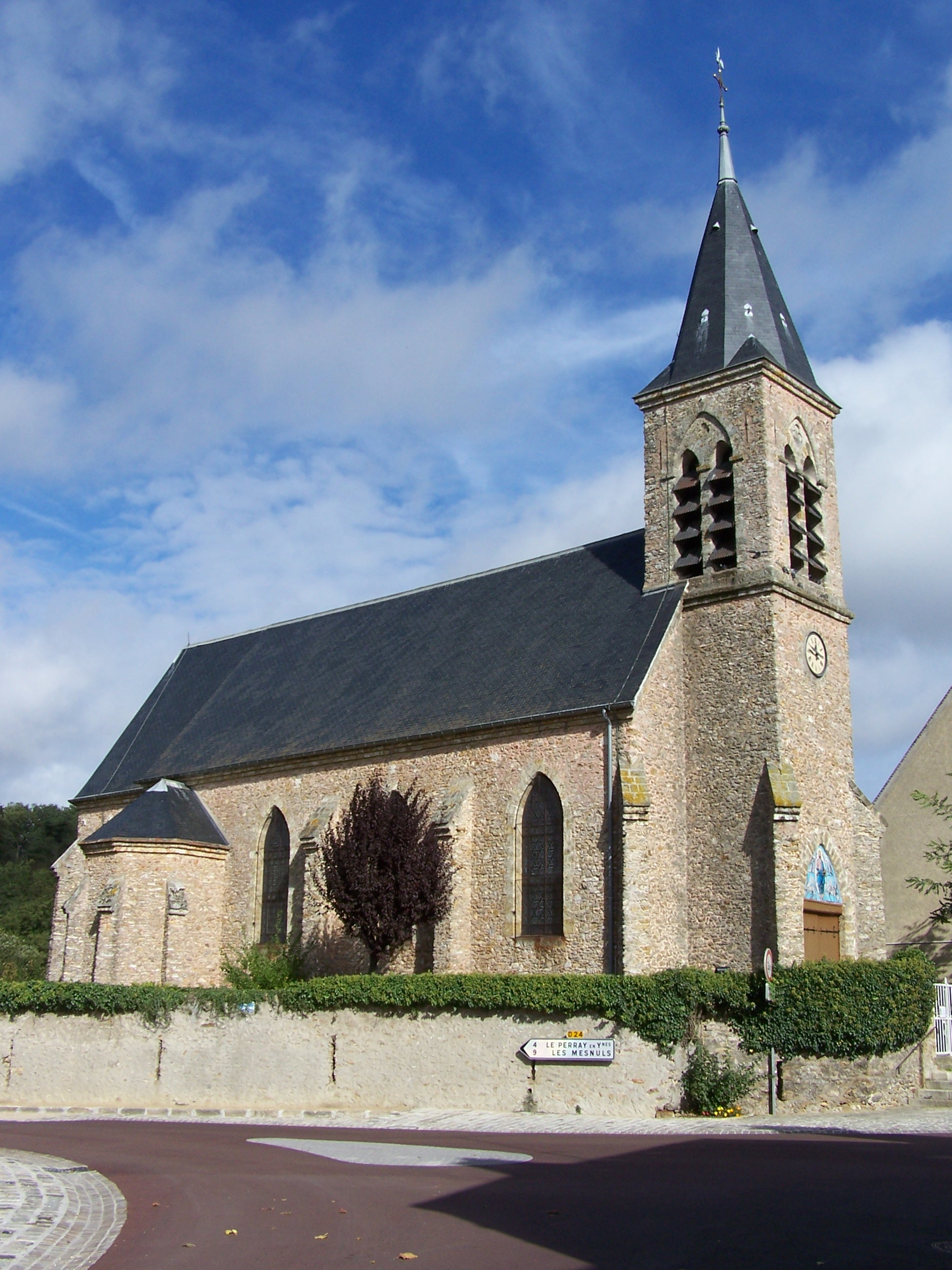 Église d'Auffargis (Yvelines, France)